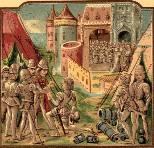 V pozadí svatba Marie Uherské se Zikmundem, vpředu tábor Ludvíka I. z Valois